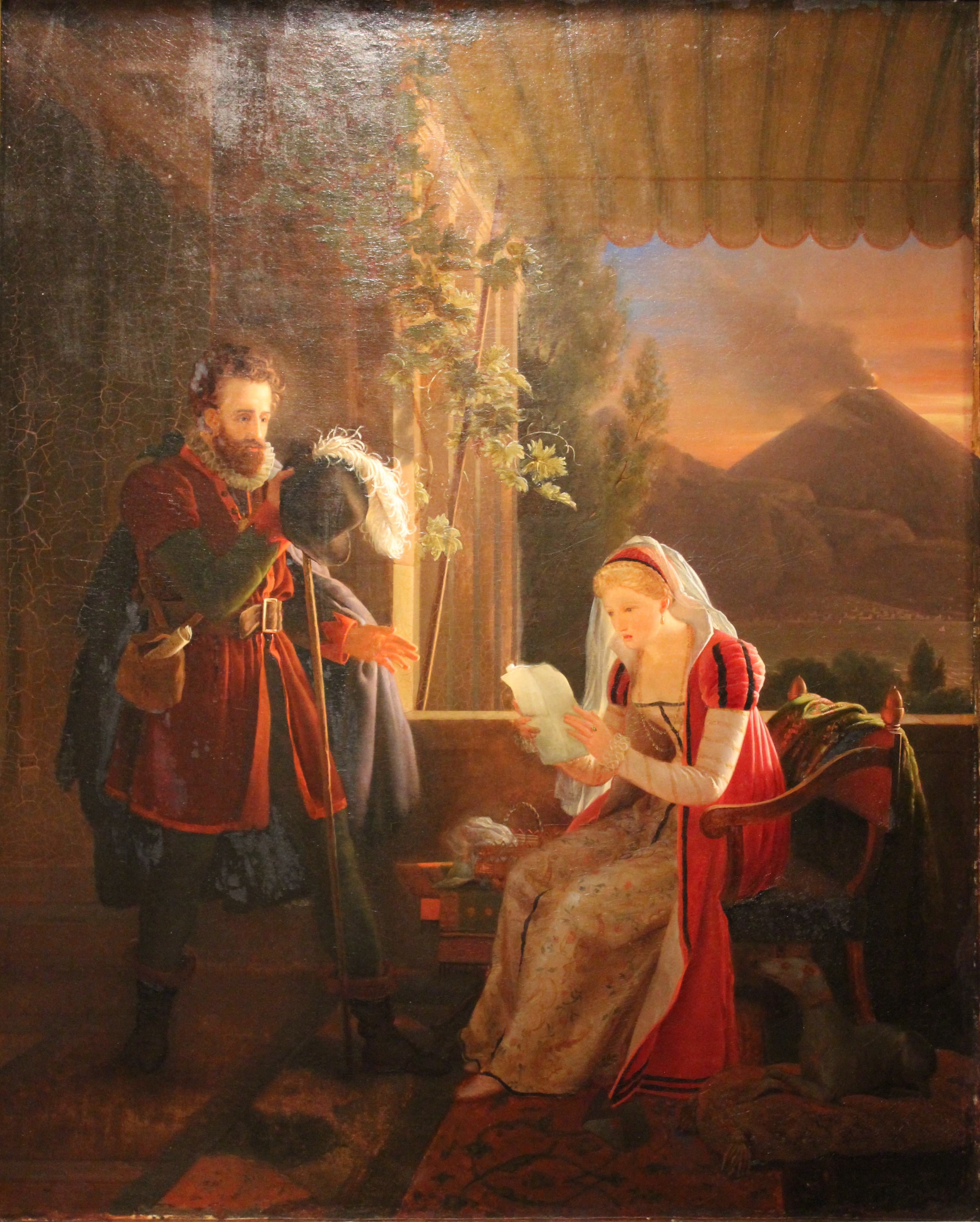 Le Tasse chez sa sœur Cornelia à Sorrente, œuvre de Louis Ducis en 1812.